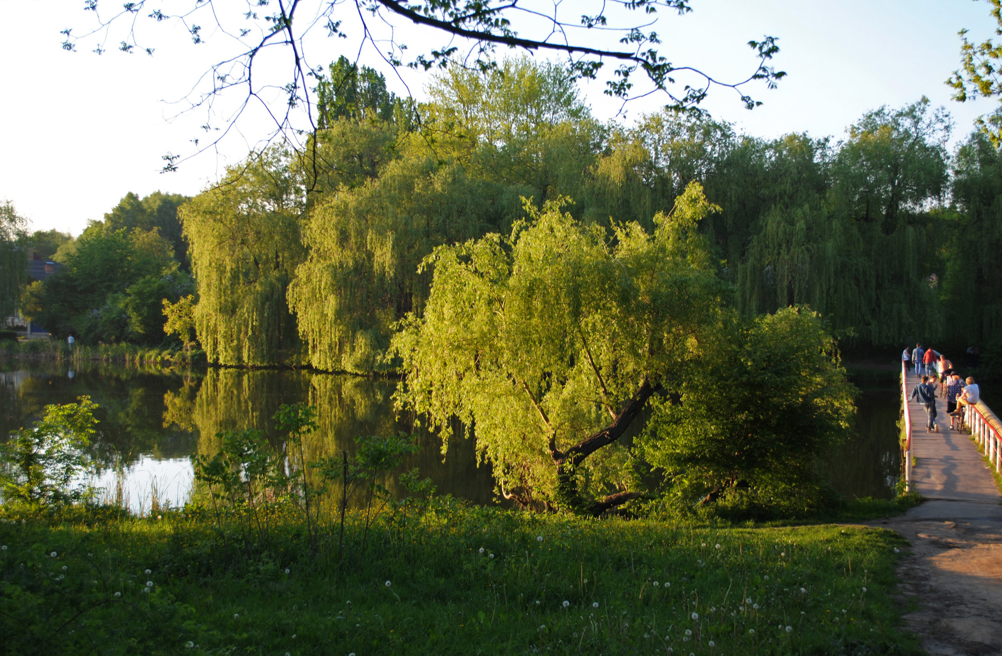 Ботанічний сад «Поділля», м. Вінниця, вул. Пирогова,155